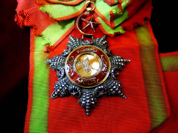 Mecidi erste Klasse